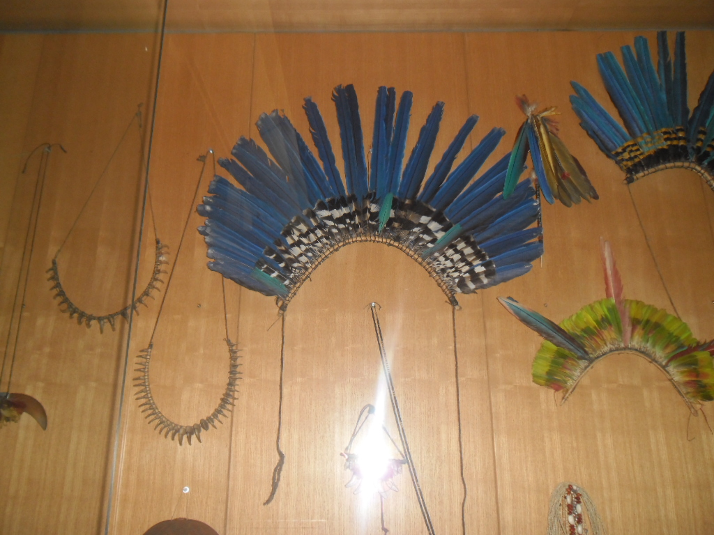 Etnografski muzej u Zagrebu